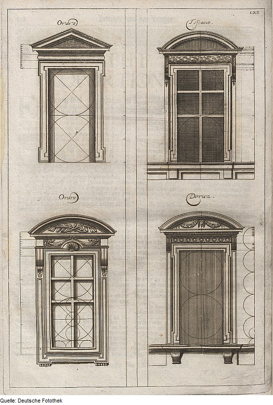 Original image description from the Deutsche Fotothek Architektur & Fenster & Giebel & Segmentgiebel & Dreiecksgiebel & Proportion & Ornament